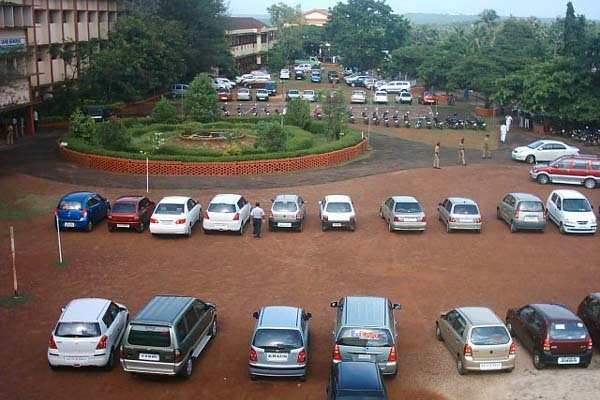 പി.എസ്.എം.ഒ. കോളേജ്